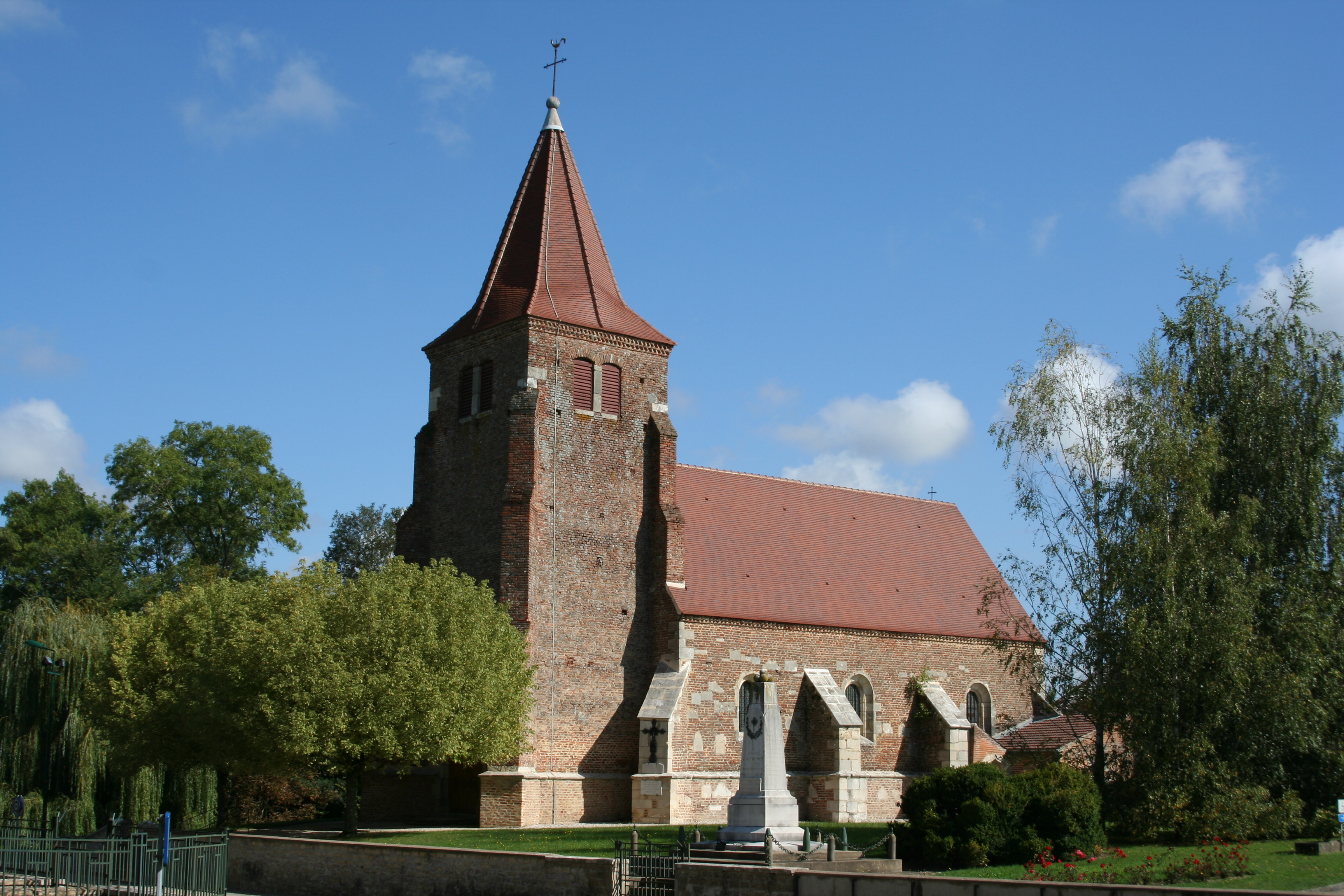 Authumes - Eglise